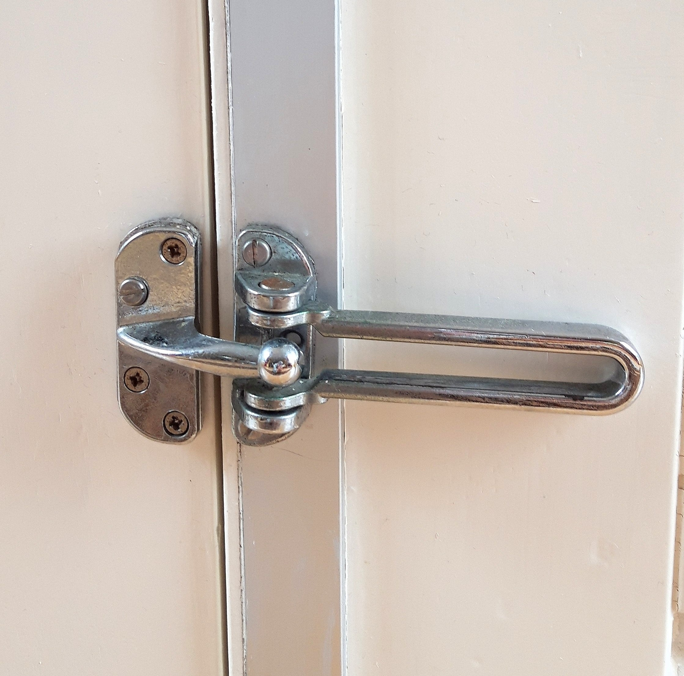 deurkierstandhouder